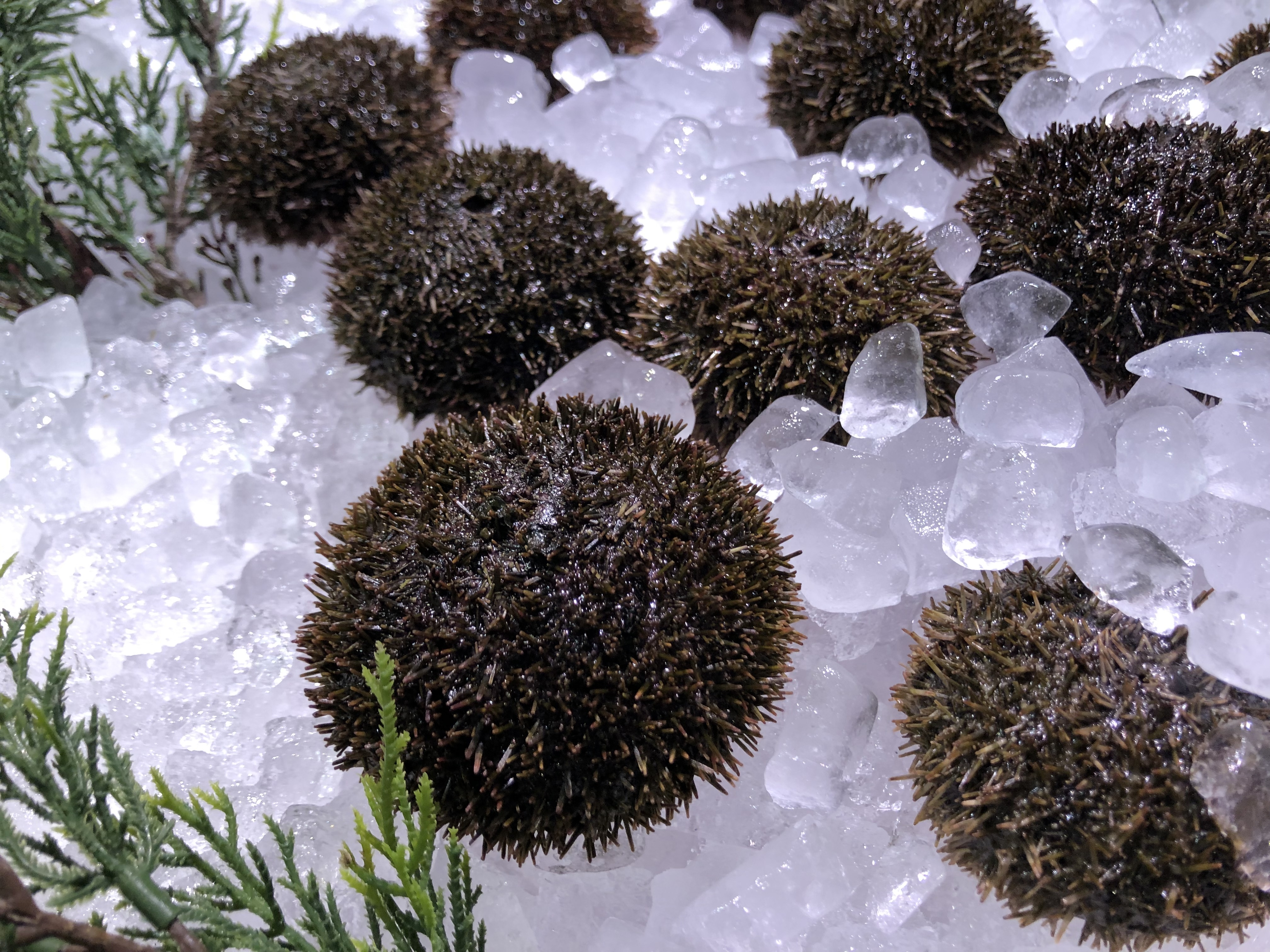 市場に並んだja:北海道産のja:バフンウニ。